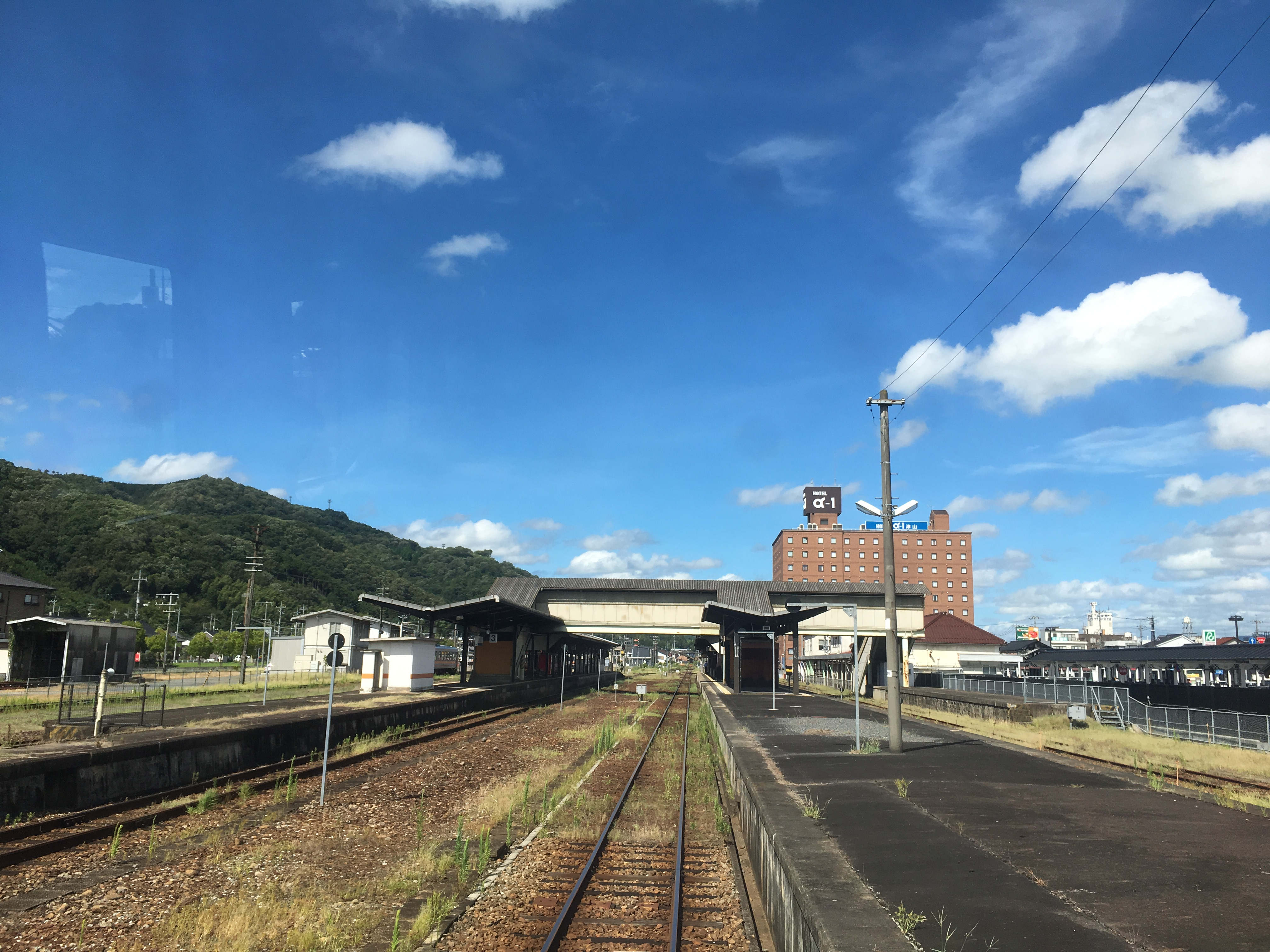 津山駅 (Tsuyama Station)